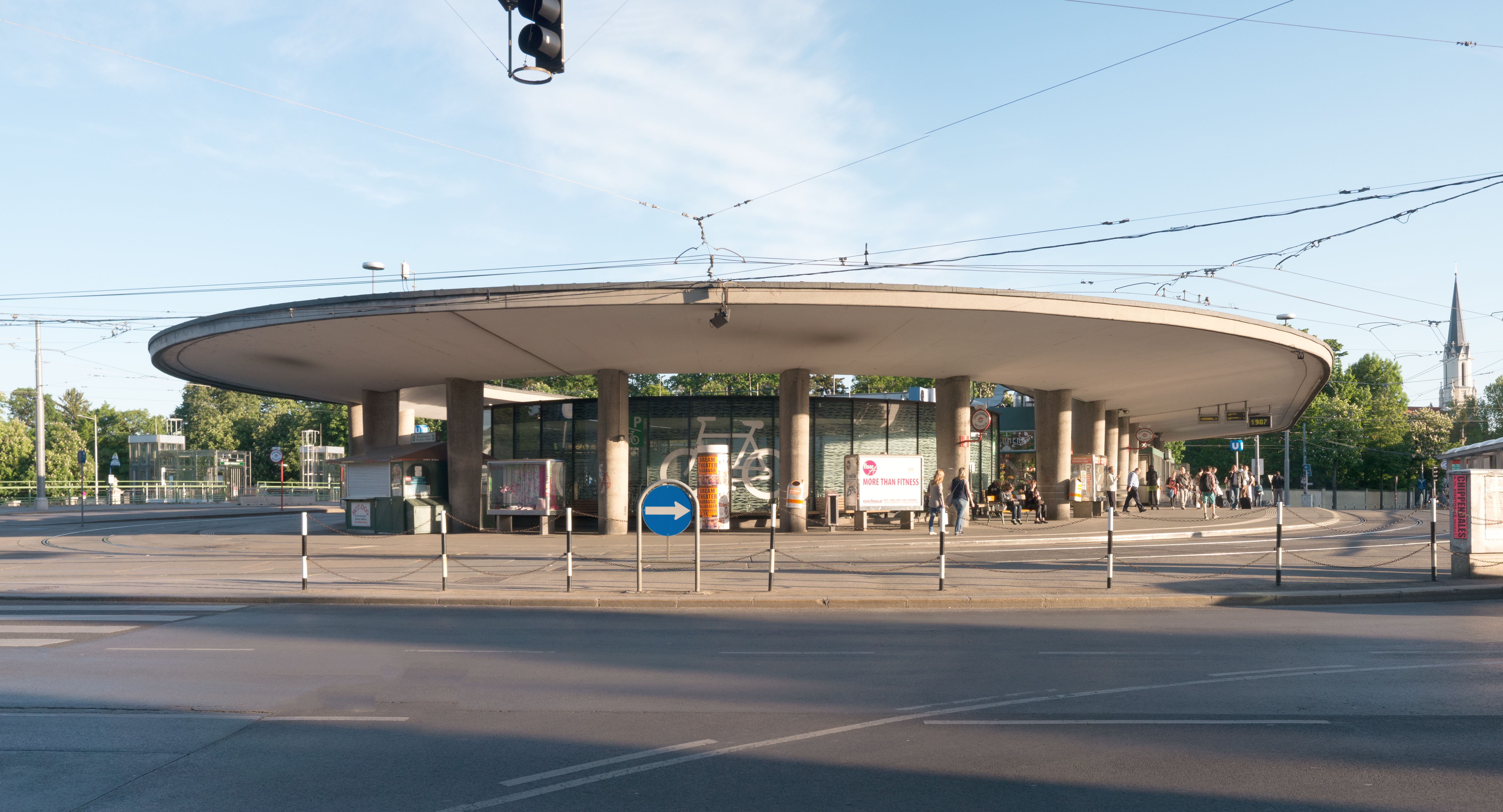 Stationsgebäude, U-Bahn Station Kennedybrücke (Außenerscheinung)